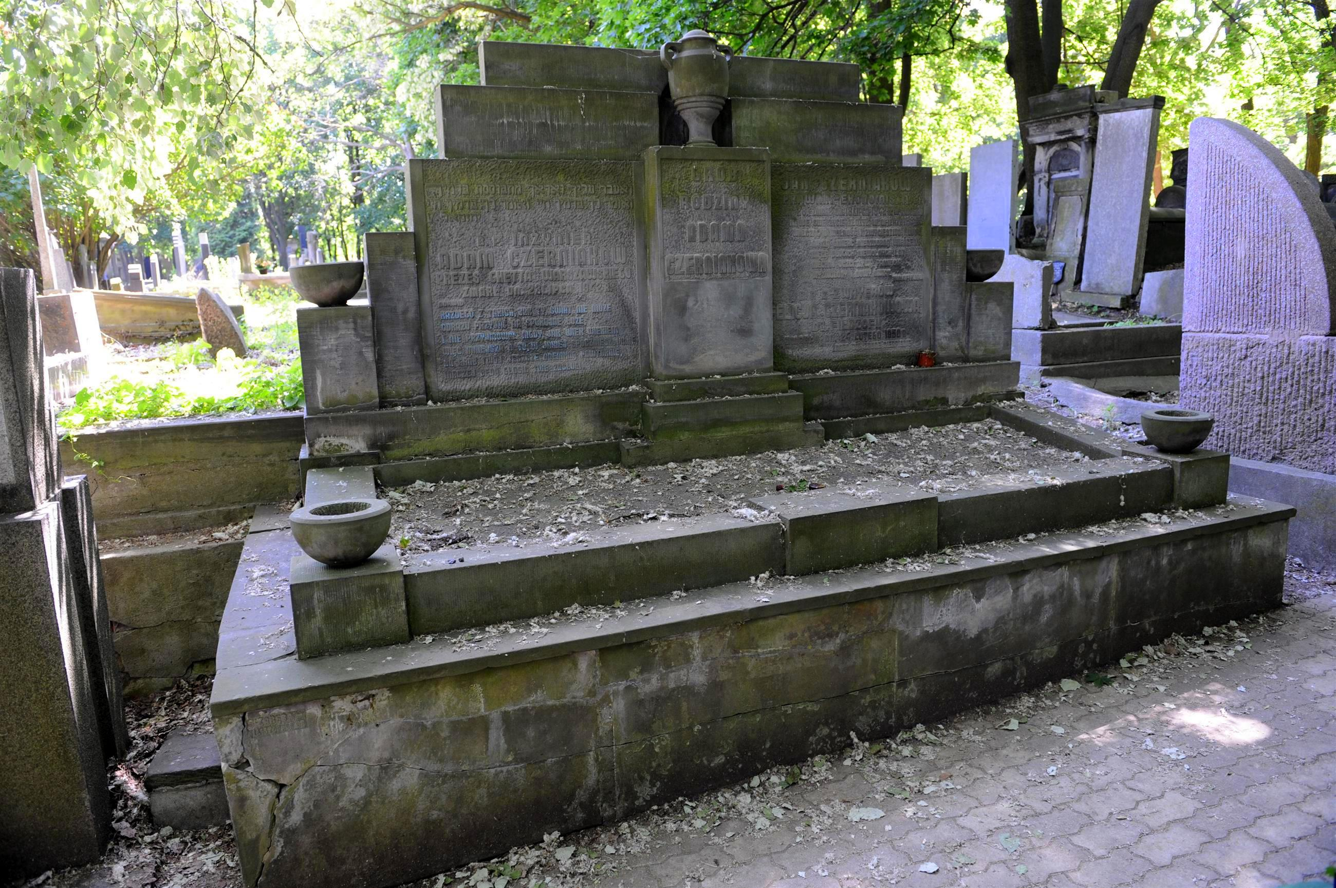 Grób Adama Czerniakowa na Cmentarzu Żydowskim w Warszawie